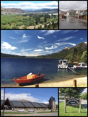 Montaje de Esquel, Patagonia Argentina